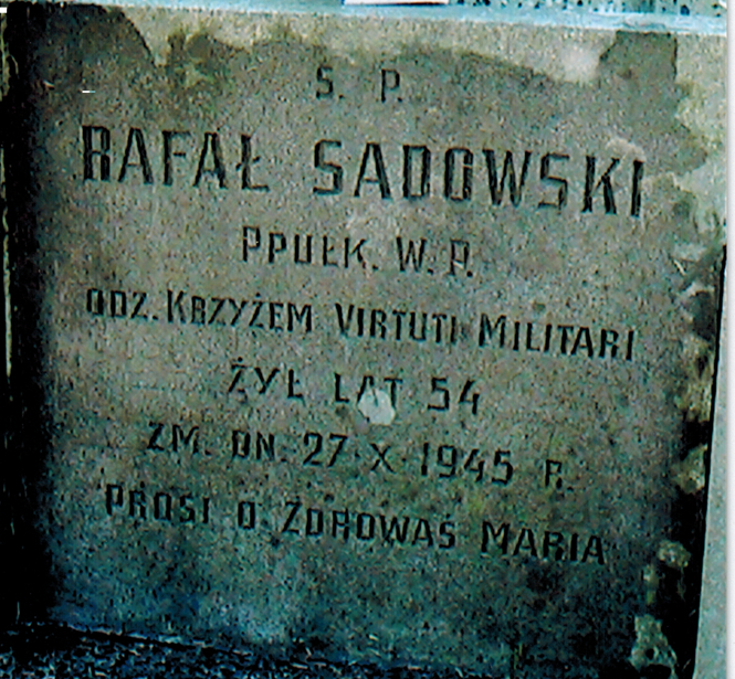 Nagrobek Rafała Sadowskiego na Wojskowych Powązkach w Warszawie